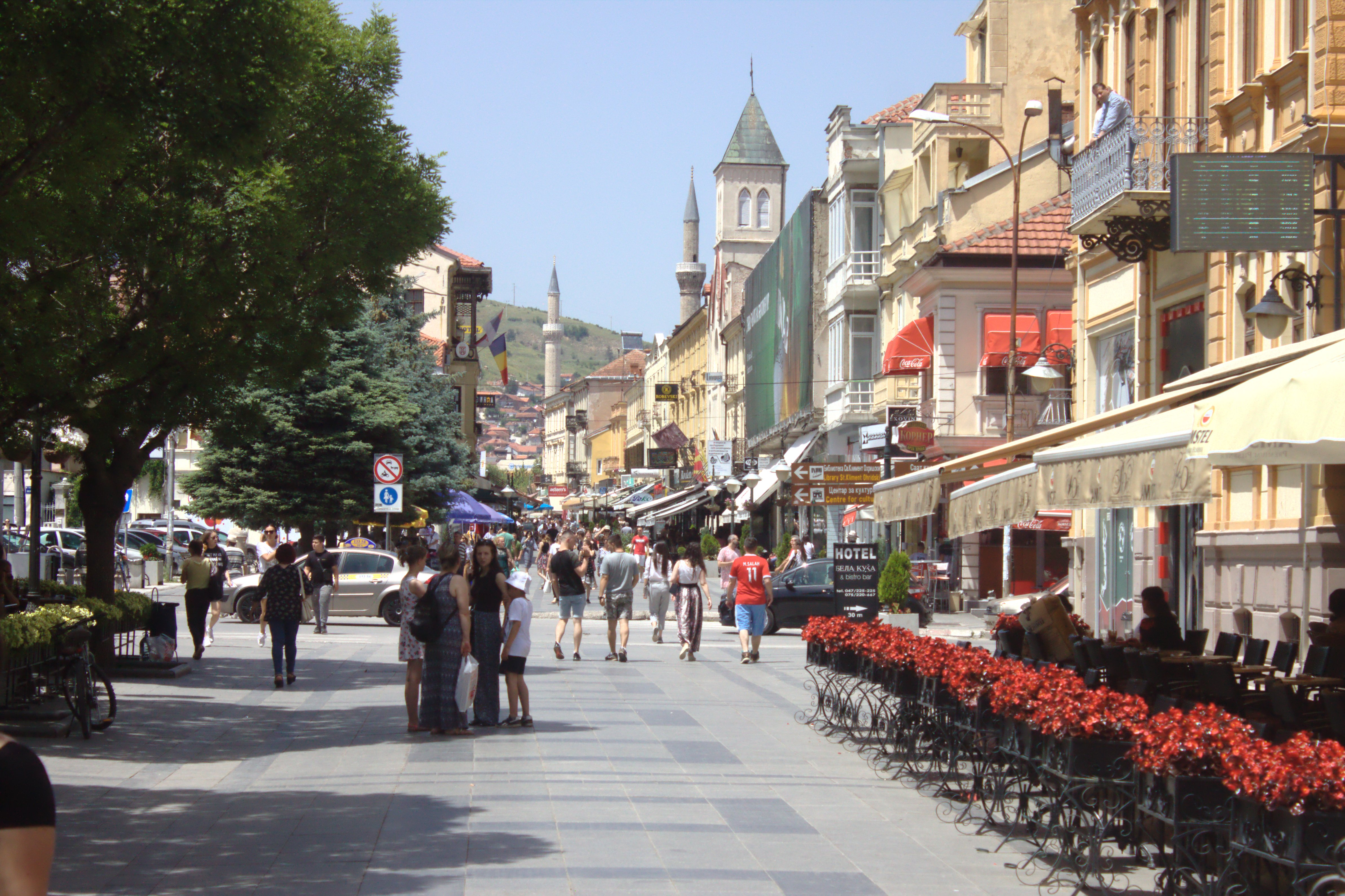 Ulice Širok Sokak ve městě Bitola, Severní Makedonie